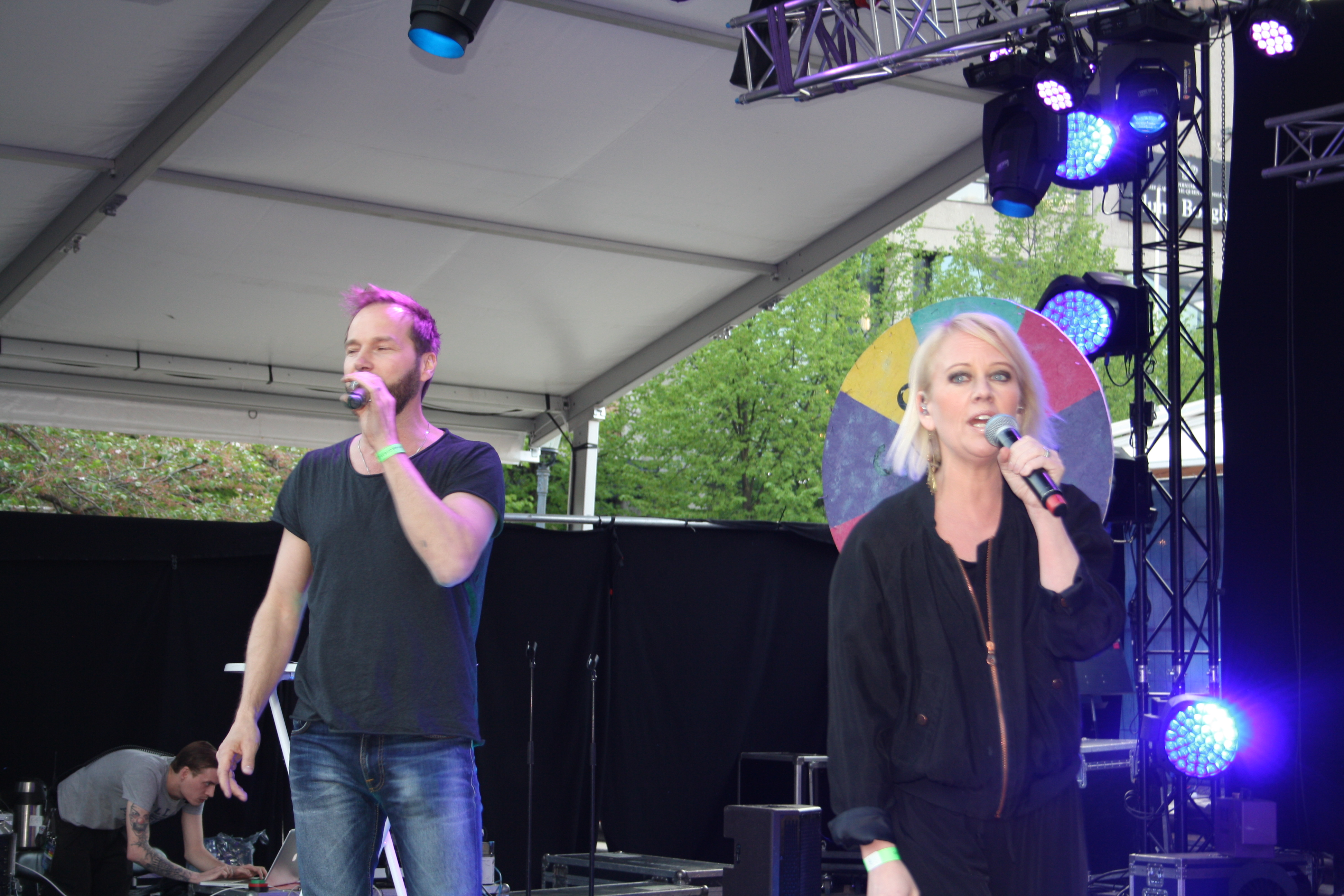 Da Buzz - Eurovision Village 2016 2